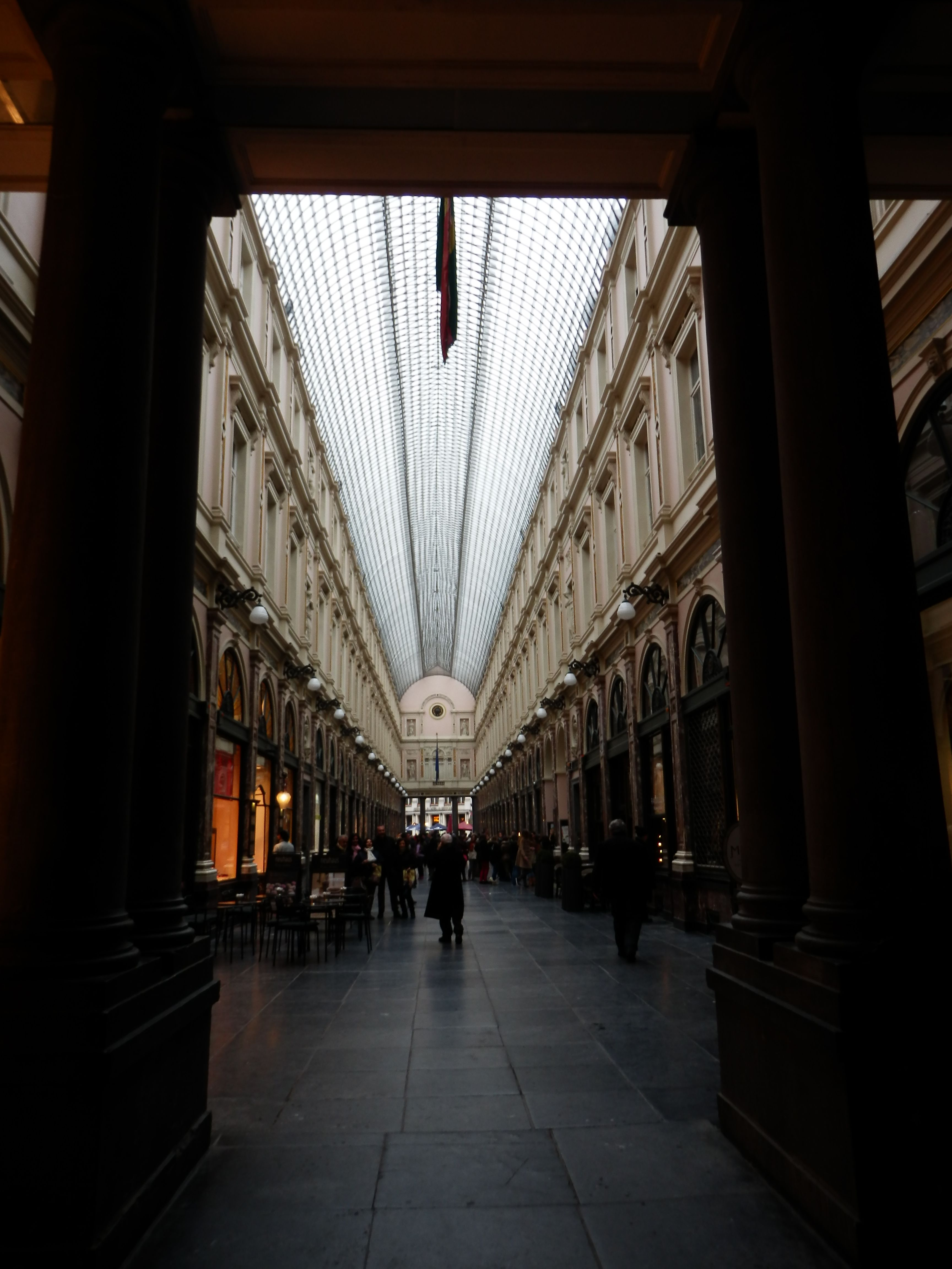 Obchodní pasáž Galerie du Roi v Bruselu